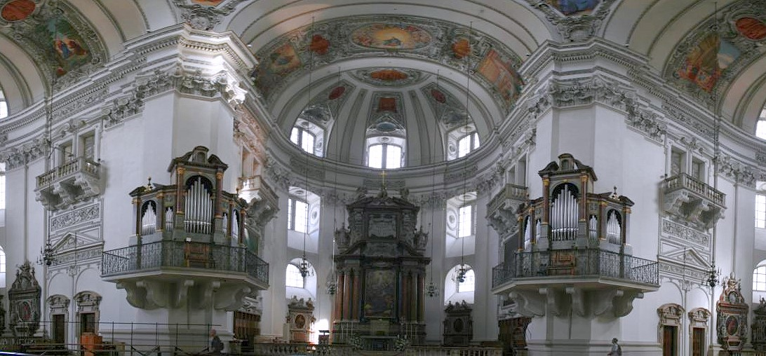 Salzburger Dom